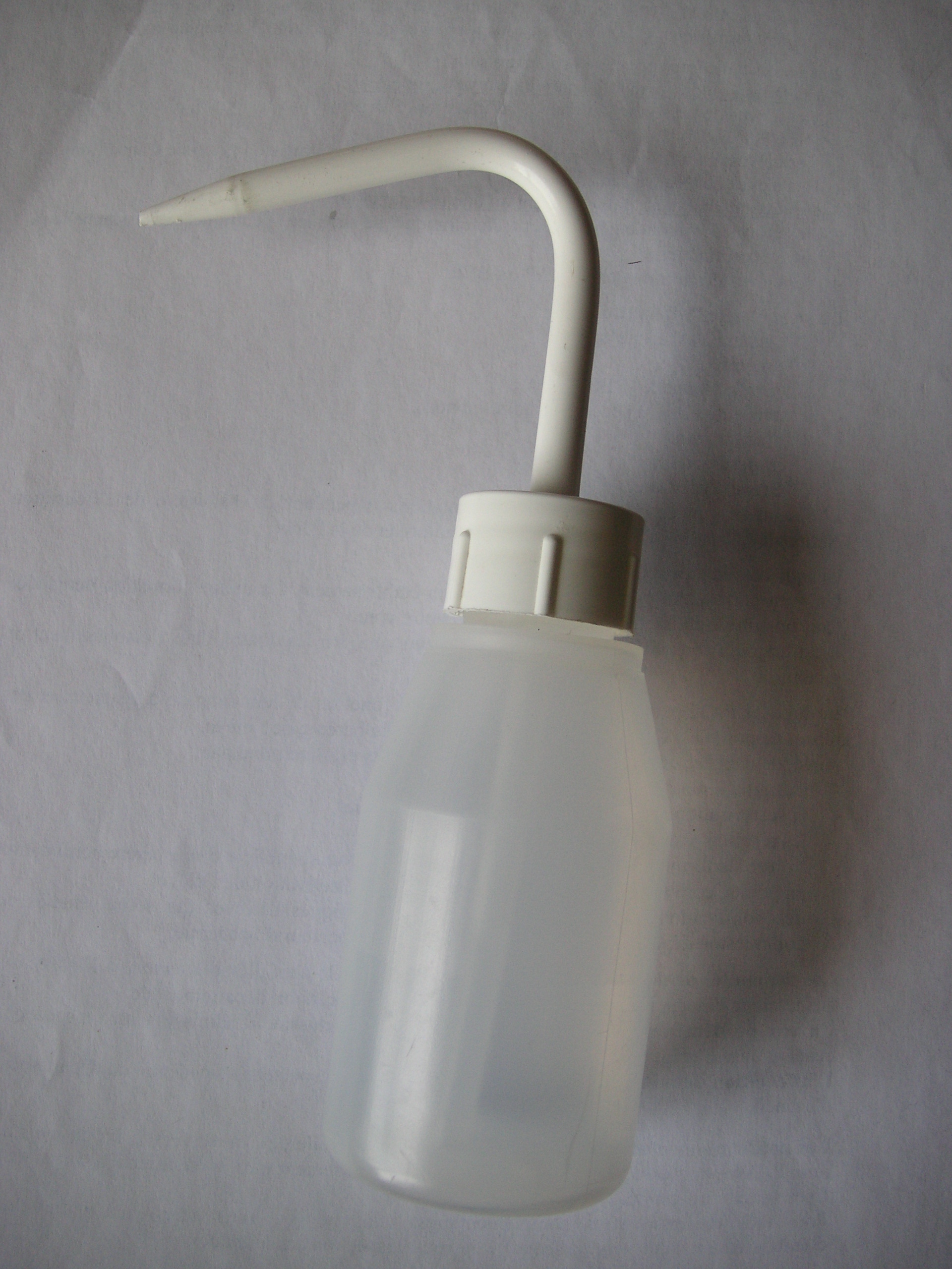 Photo d'une pissette